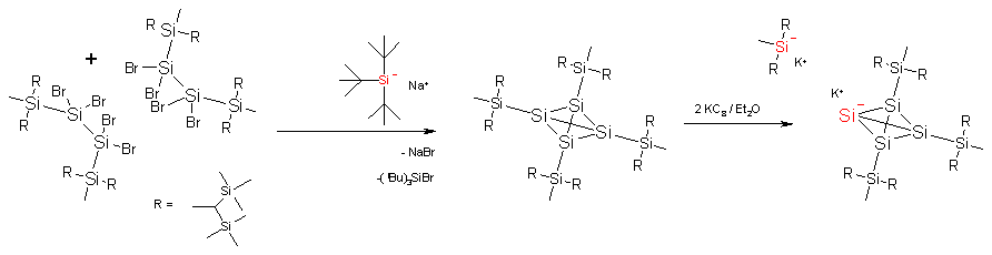 Tetrasilatetrahedrane